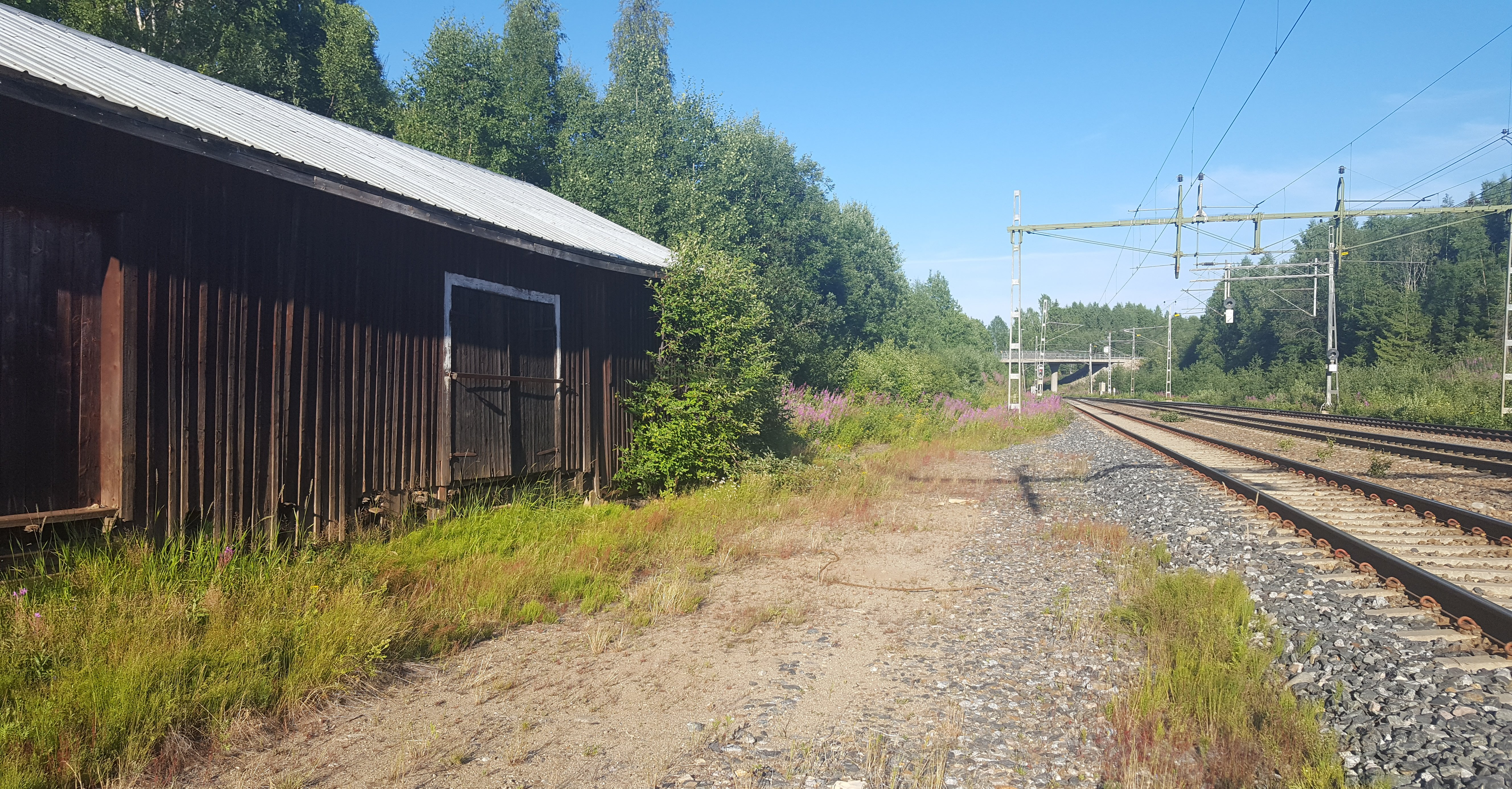 Stationshus i Anundsjö